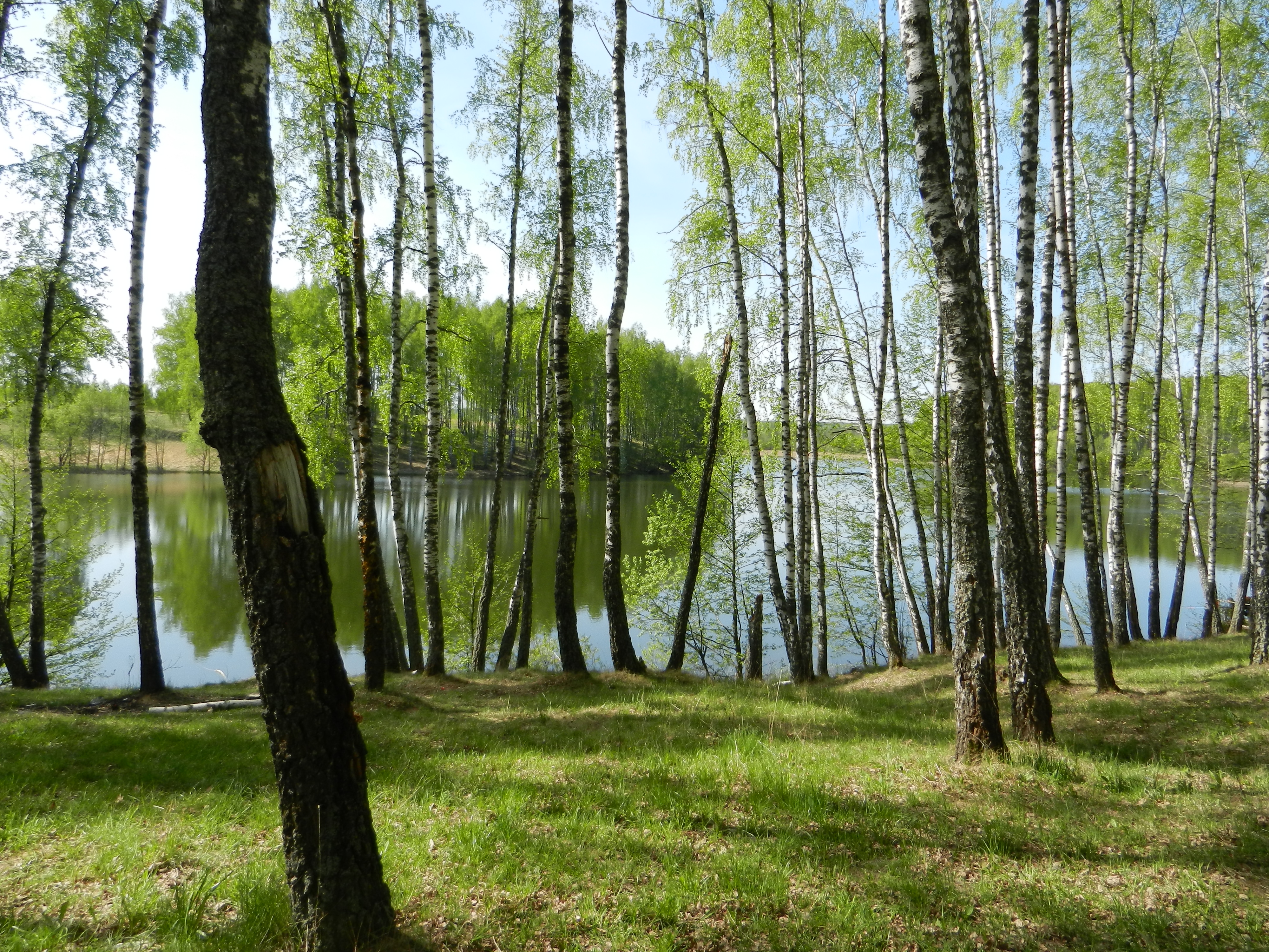 Березовая роща и озеро у д. Вяхори, Рославльский район This image is related to the protected area of Russia number 6710096